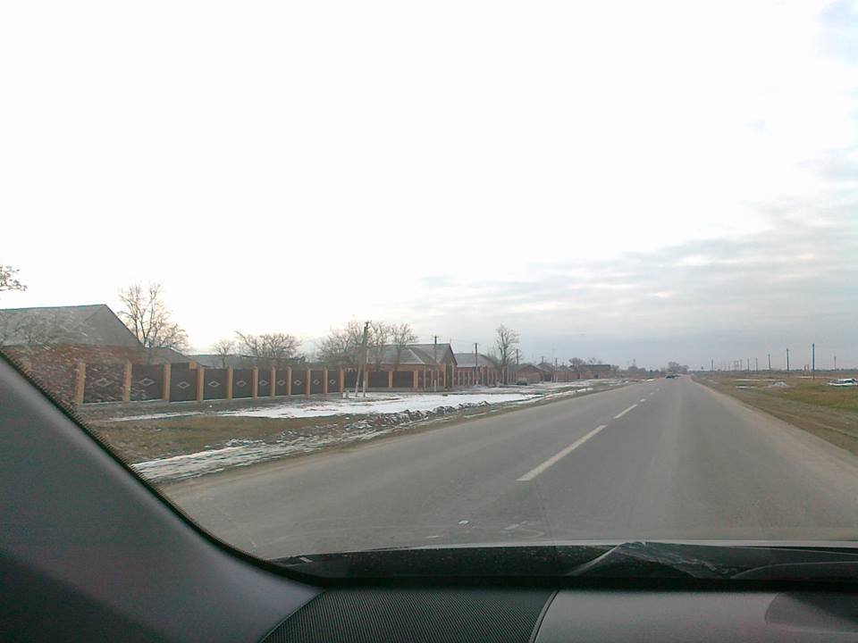 Чеченская Республлика.Воскресенский This file, which was originally posted to was reviewed on 13 February 2017 by reviewer INeverCry, who confirmed that it was available there under the stated license on that date.